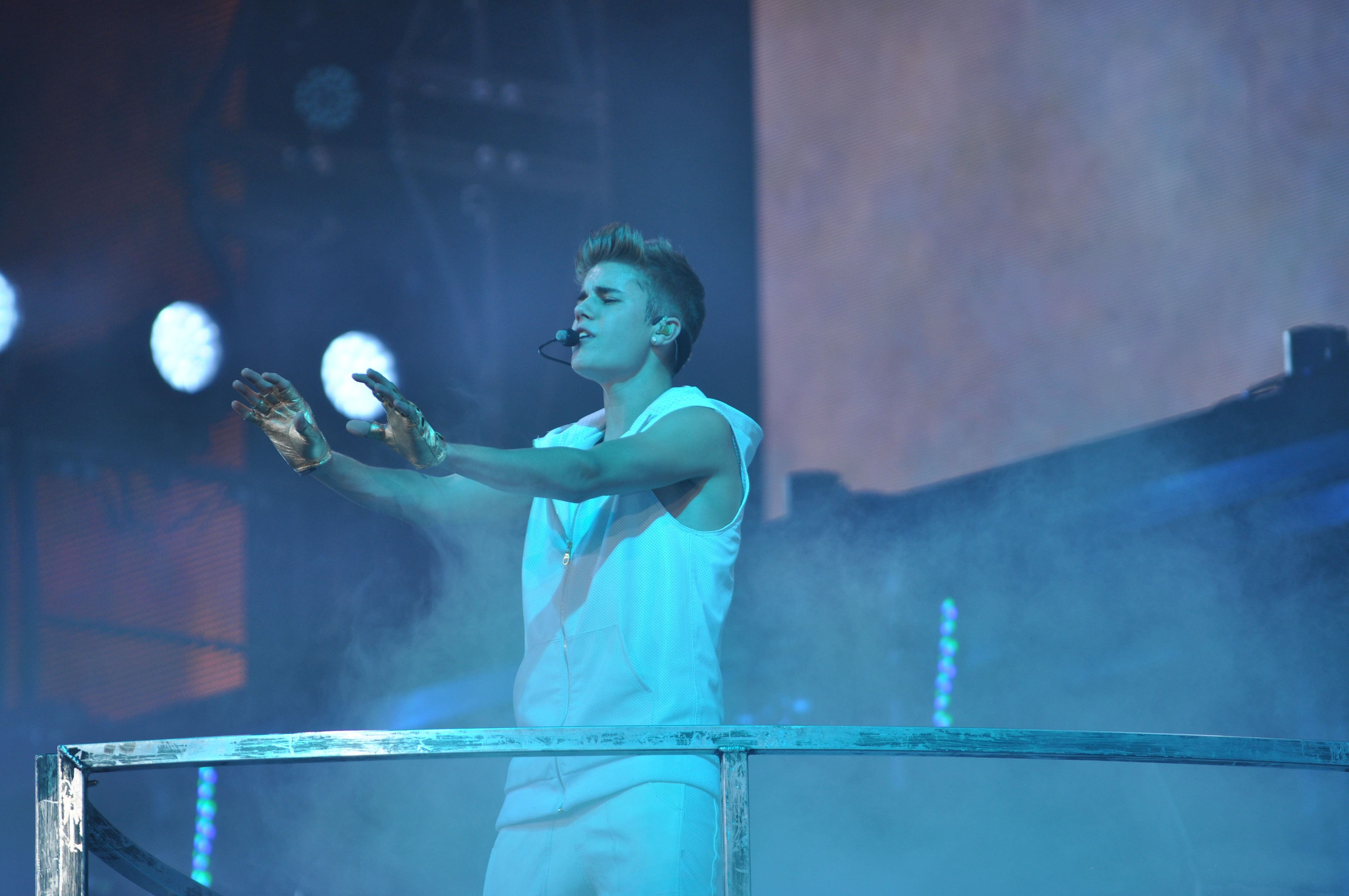 Justin Bieber -DSC_0639-10.20.12